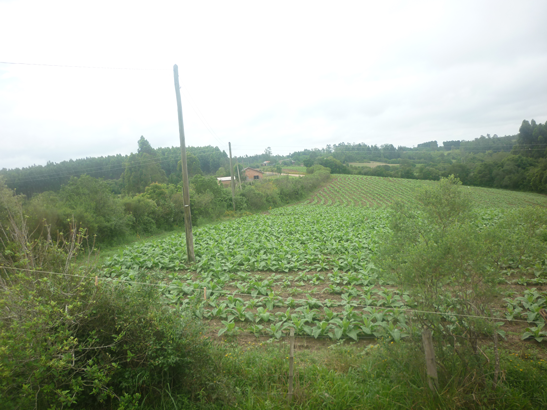 Imagem do distrito de Amaral Ferrador, Colônia Santo Antônio.